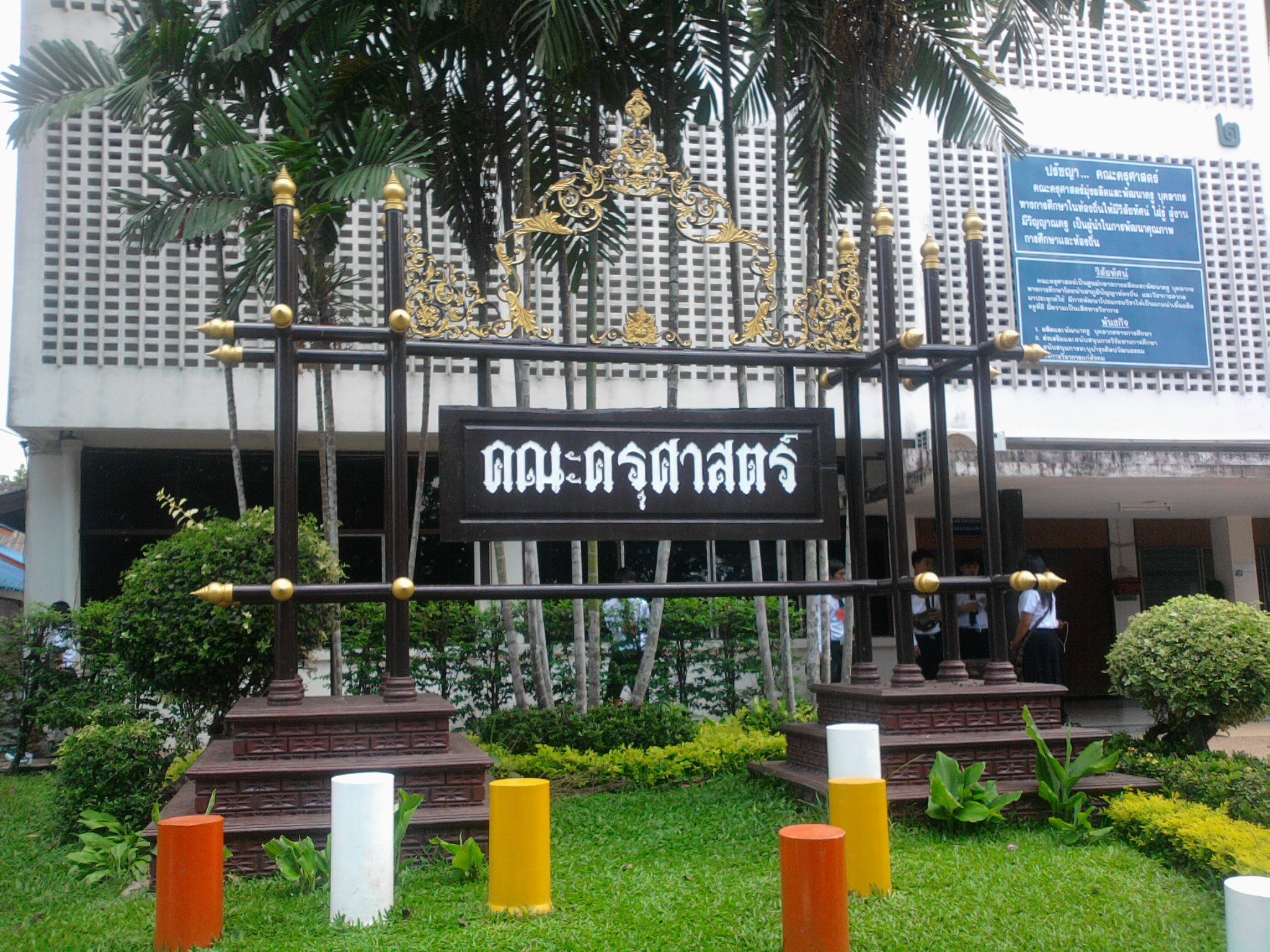 มหาวิทยาลัยราชภัฏสกลนคร